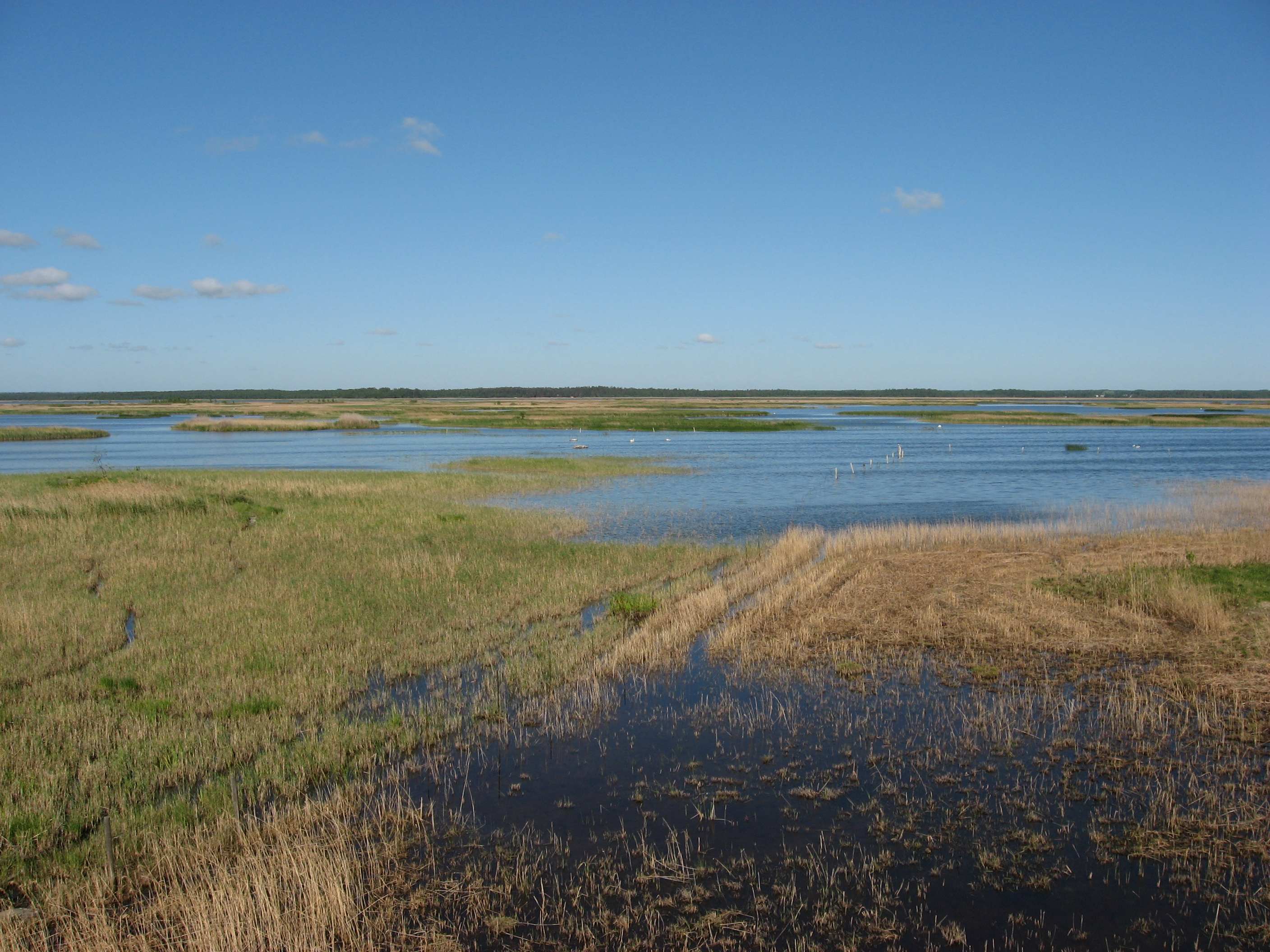 Mērsraga pagasts, Latvia